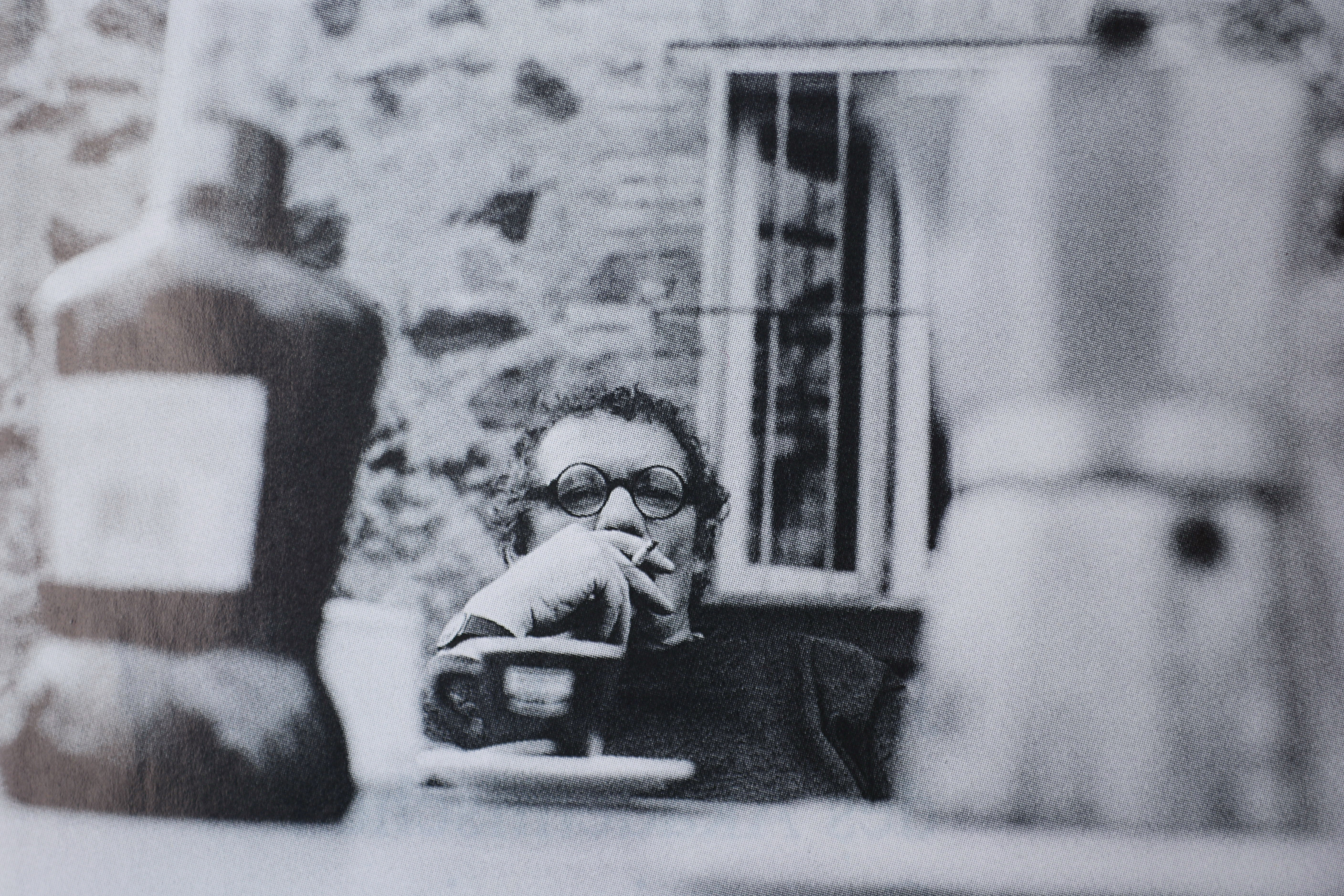 Hartmut Urban; eigene Aufnahme des Autors; Dieses Bild ist auch veröffentlicht in: Jahresbericht des Akademischen Gymnasiums Graz 1996/97, Graz 1997, Seite 2